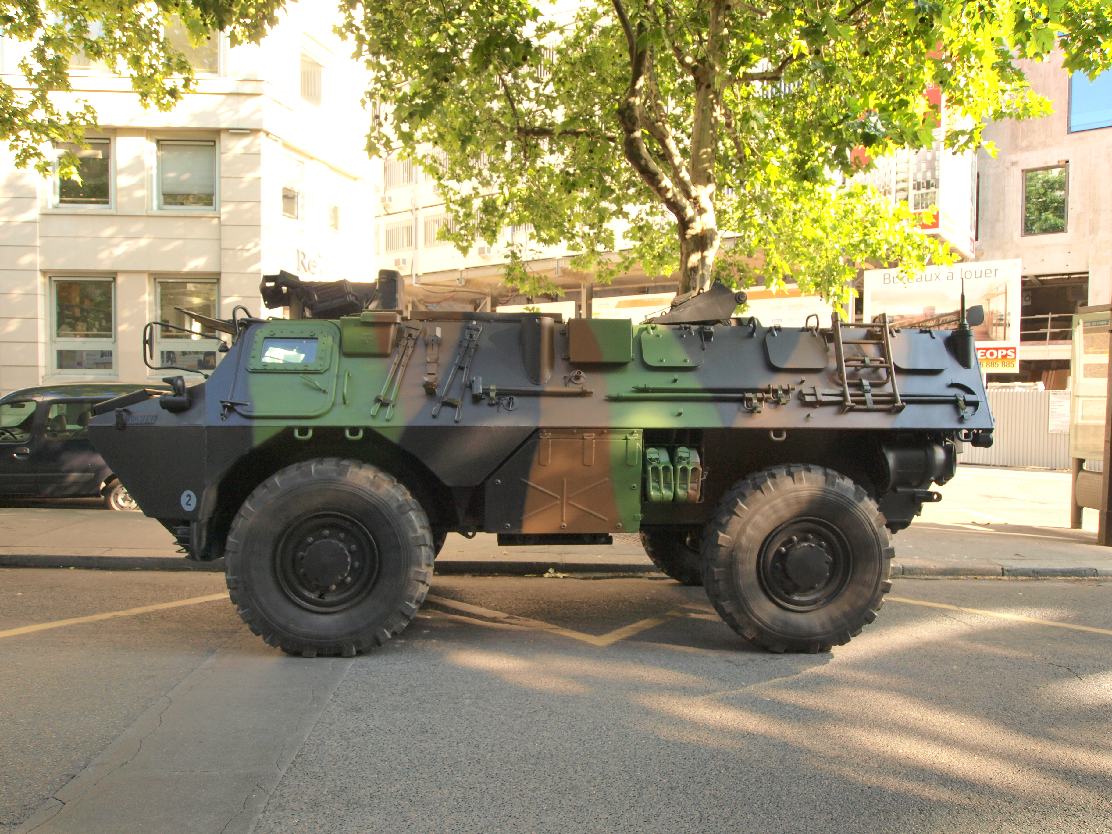 Véhicule de l'Avant Blindé, VAB 4x4, army licence registration 6923 0035